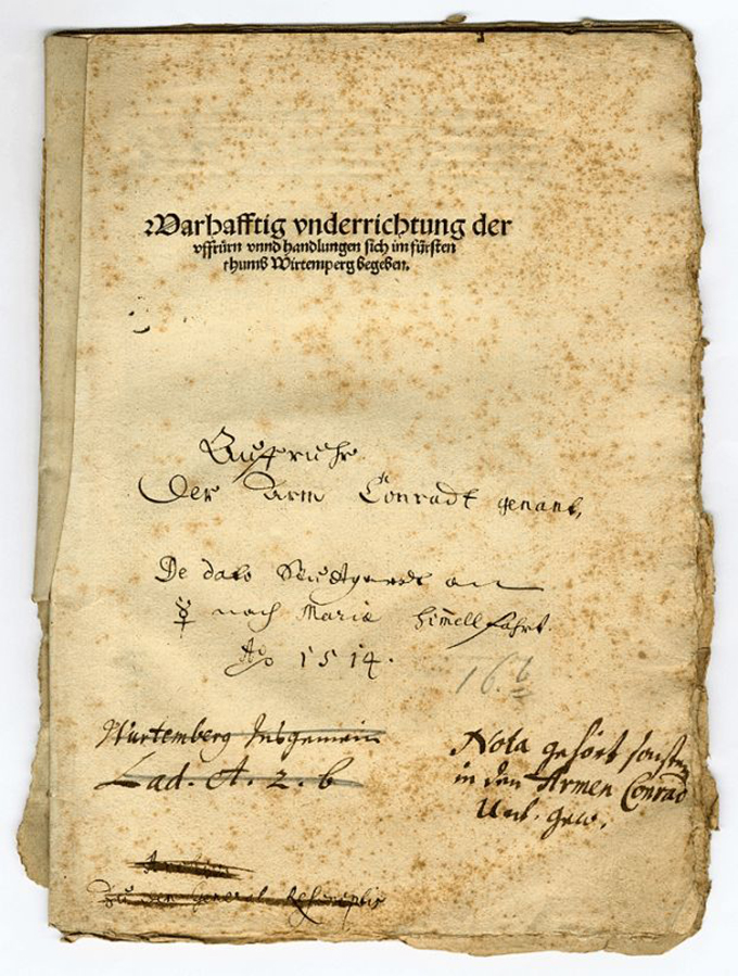 Kanzleibericht über den Aufstand des Armen Konrads 1514